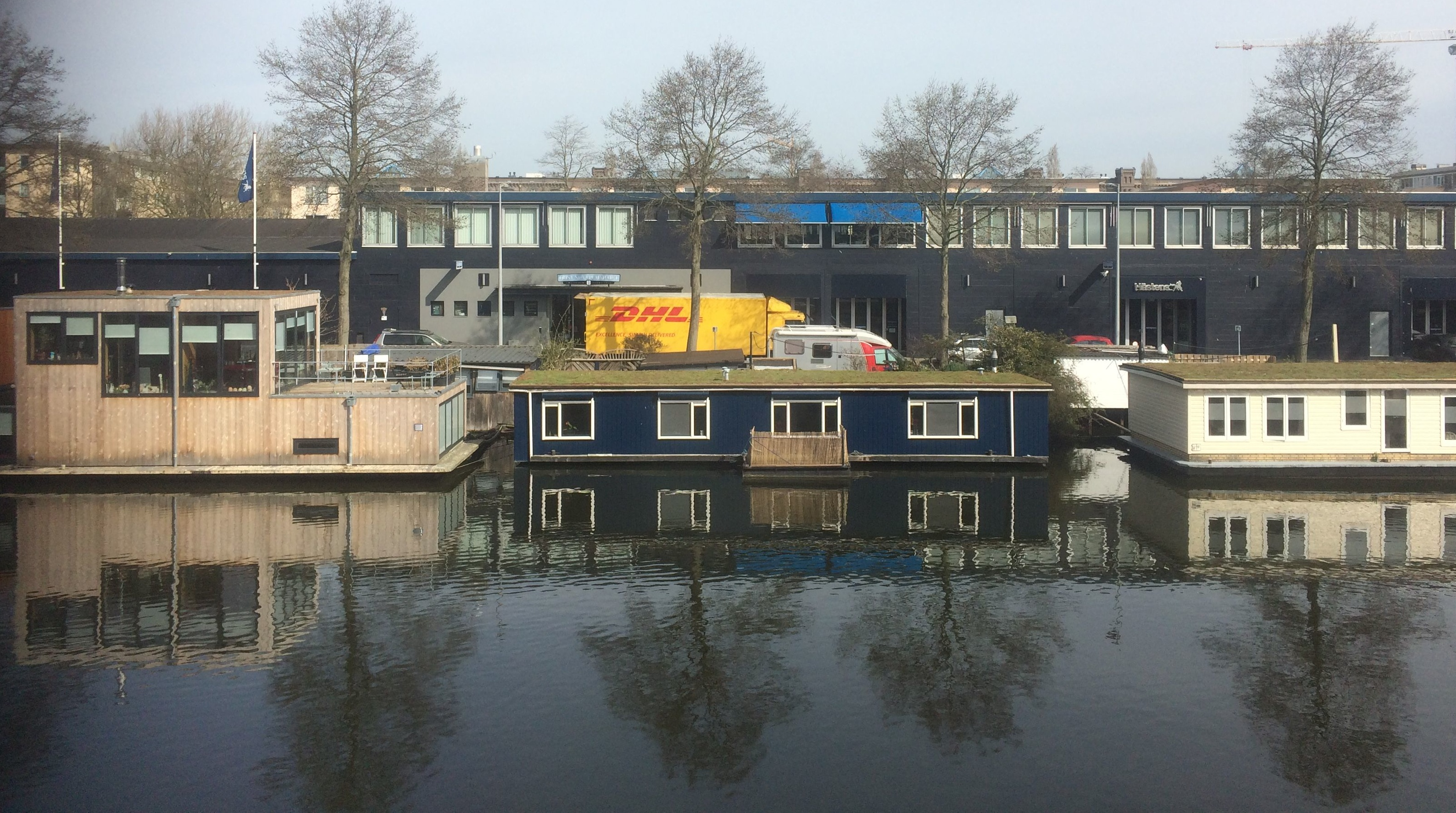 Woonboten in het lozingskanaal wijk Zeeburg in stadsdeel Oost..